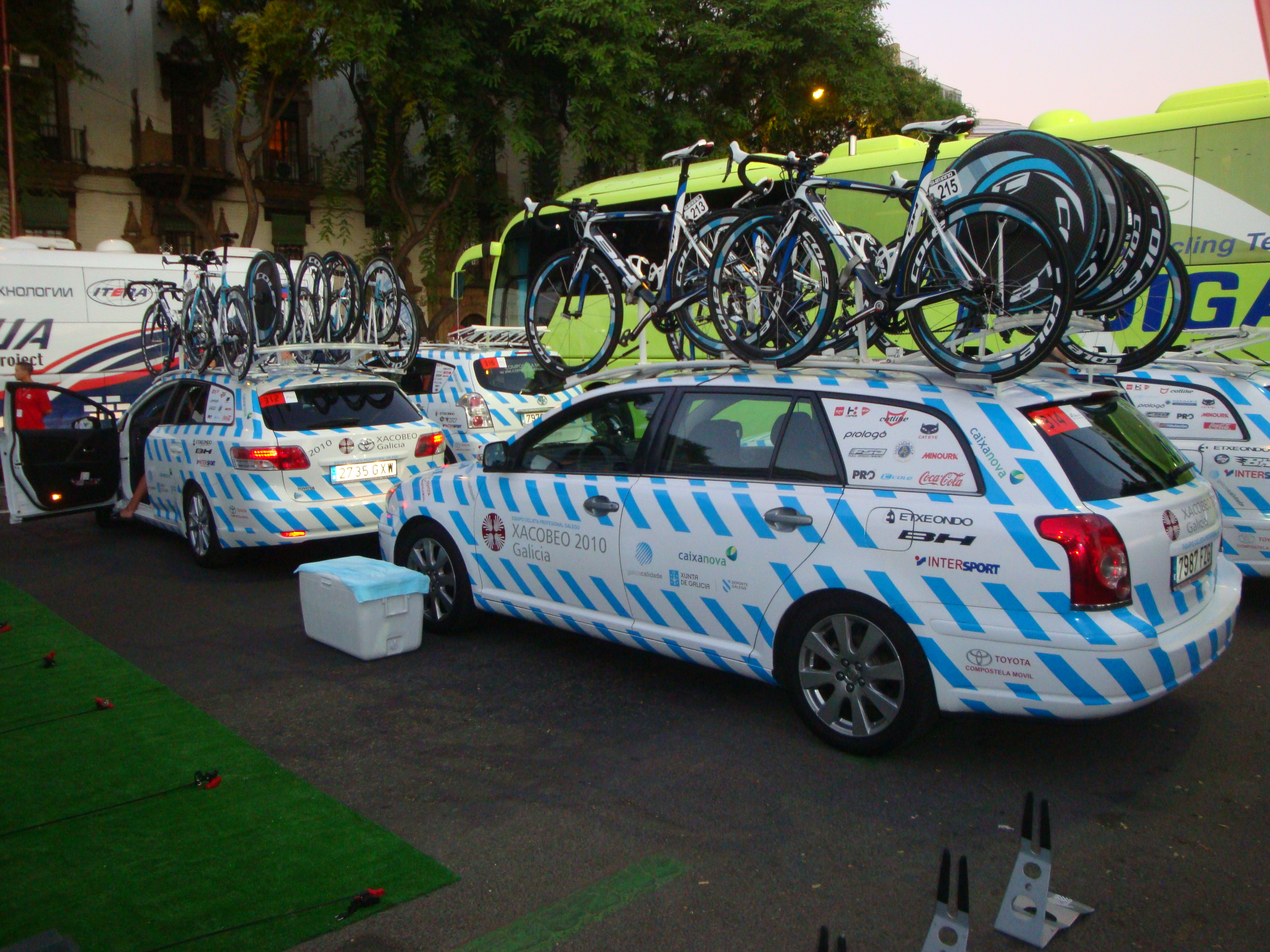 Vehículos de servicio del equipo ciclista Xacobeo Galicia en la Vuelta a España 2010